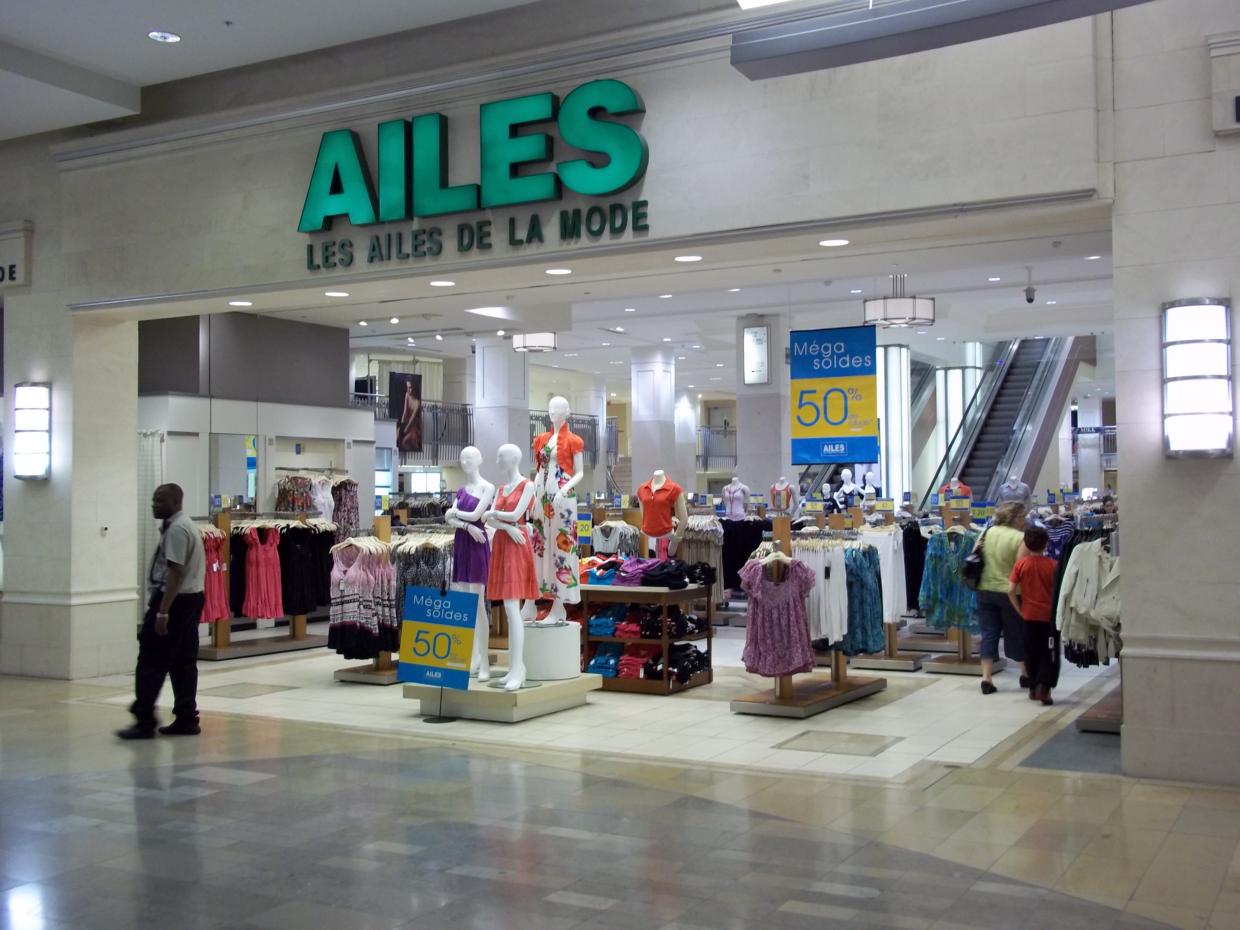 Les Ailes de la Mode, rue Sainte-Catherine, Montréal